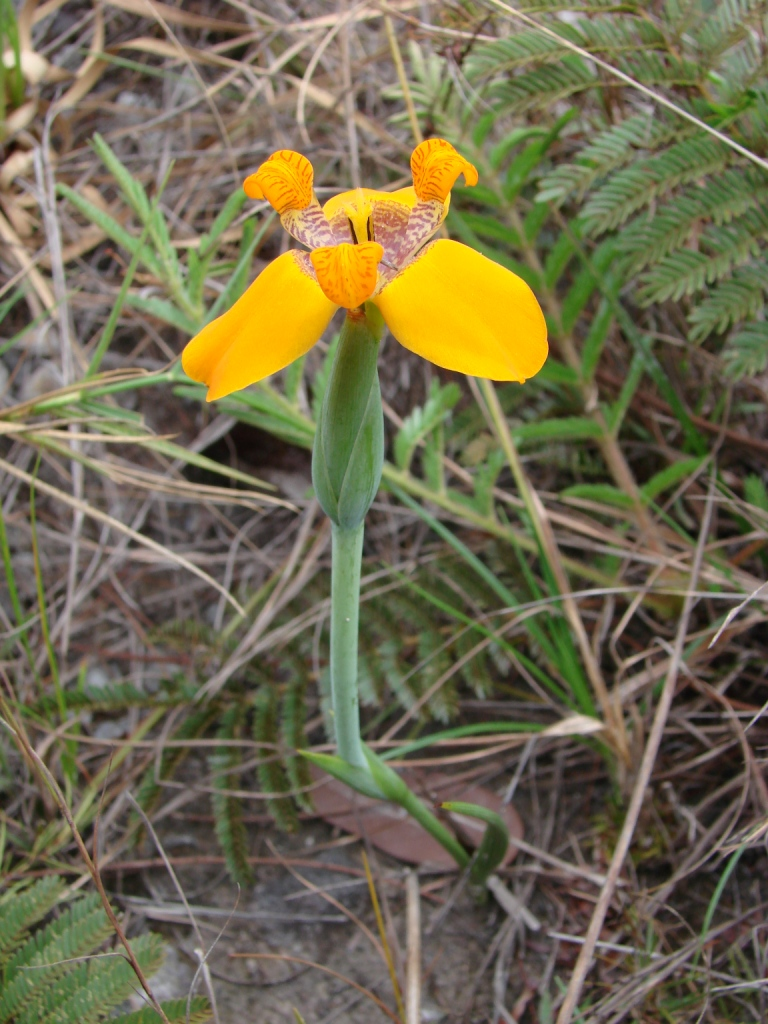 Trimezia juncifolia (Klatt) Benth & Hook. (Sin. het. Trimezia caeteana Ravenna; Trimezia concinna Ravenna) - IRIDACEAE - Reserva do Abade - Pirenópolis - Goiás - Brasil.